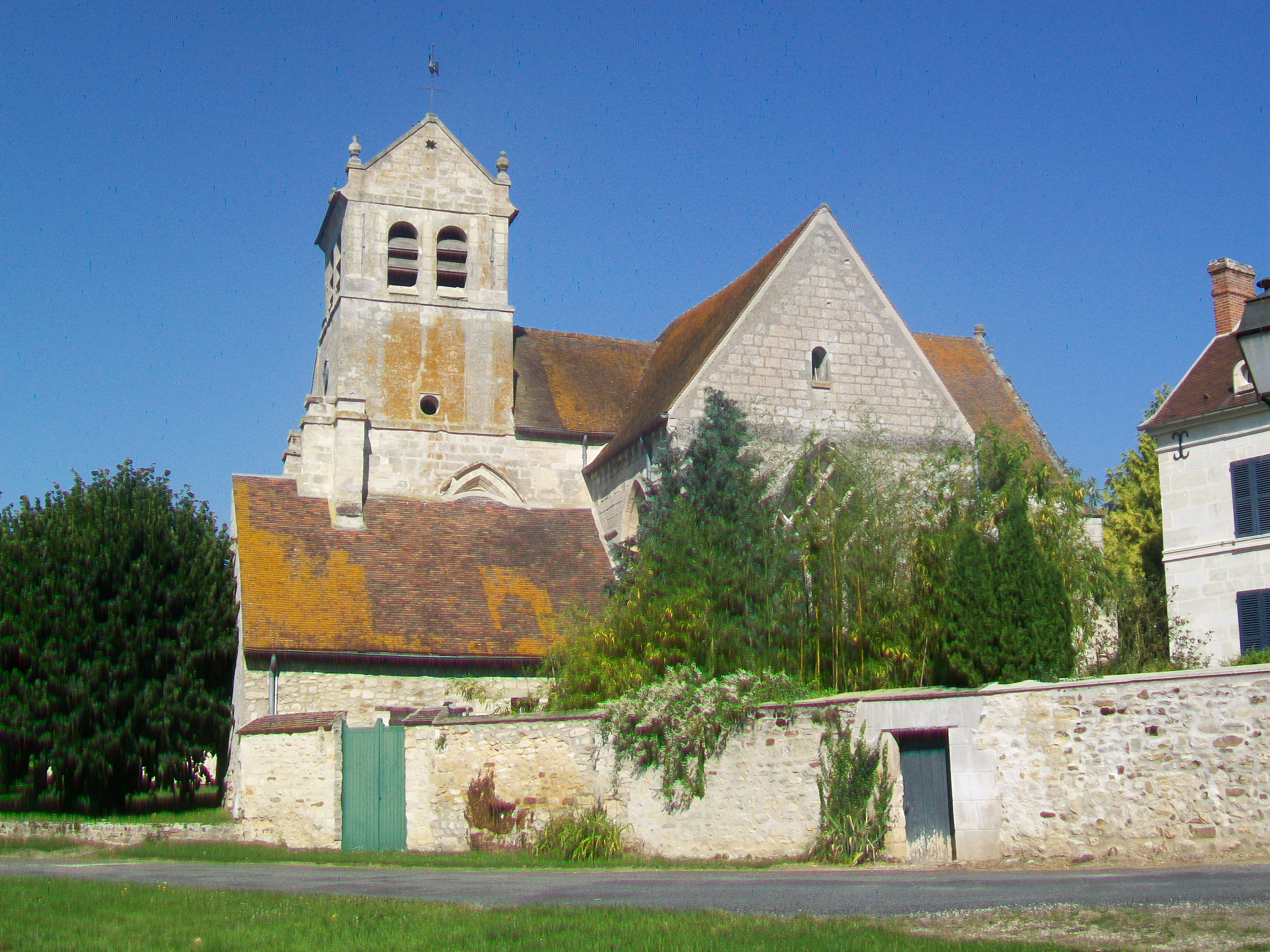 Façade orientale de l'église Saint-Romain, rue Saint-Romain